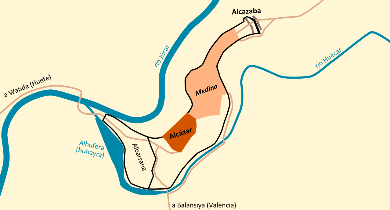 Planta aproximada de la ciudad de Cuenca en el siglo XII, antes de la conquista cristiana. Según croquis y explicaciones de: Cuevas, Pedro José (2000). «Ciudad». Cuenca. Cuenca: Alfonsípolis. p. 57-63.